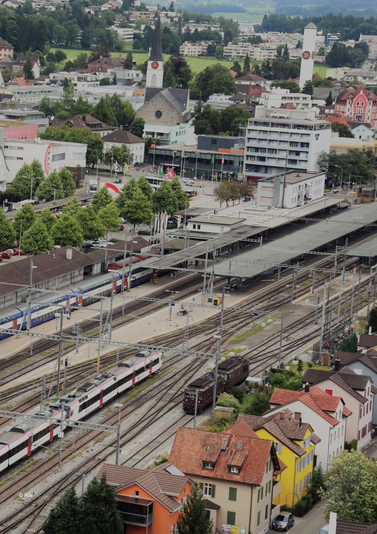 Bahnhof Wil Luftaufnahme